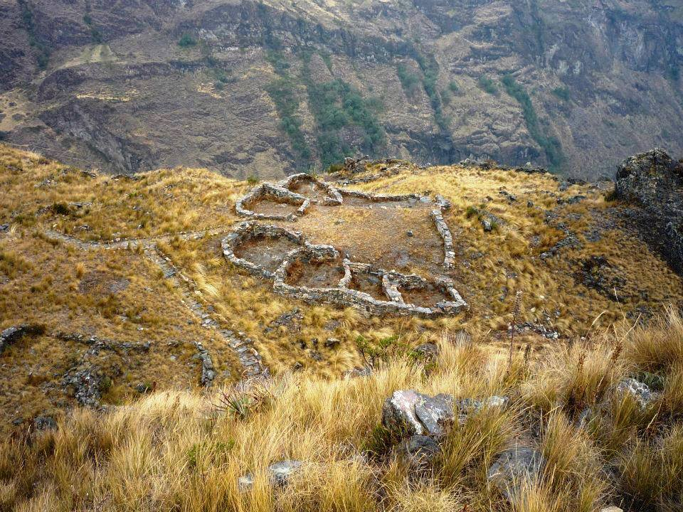 Complejo arquelógico de Huacramarca